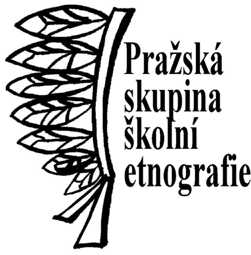 Neoficiální logo Pražské skupiny školní etnografie